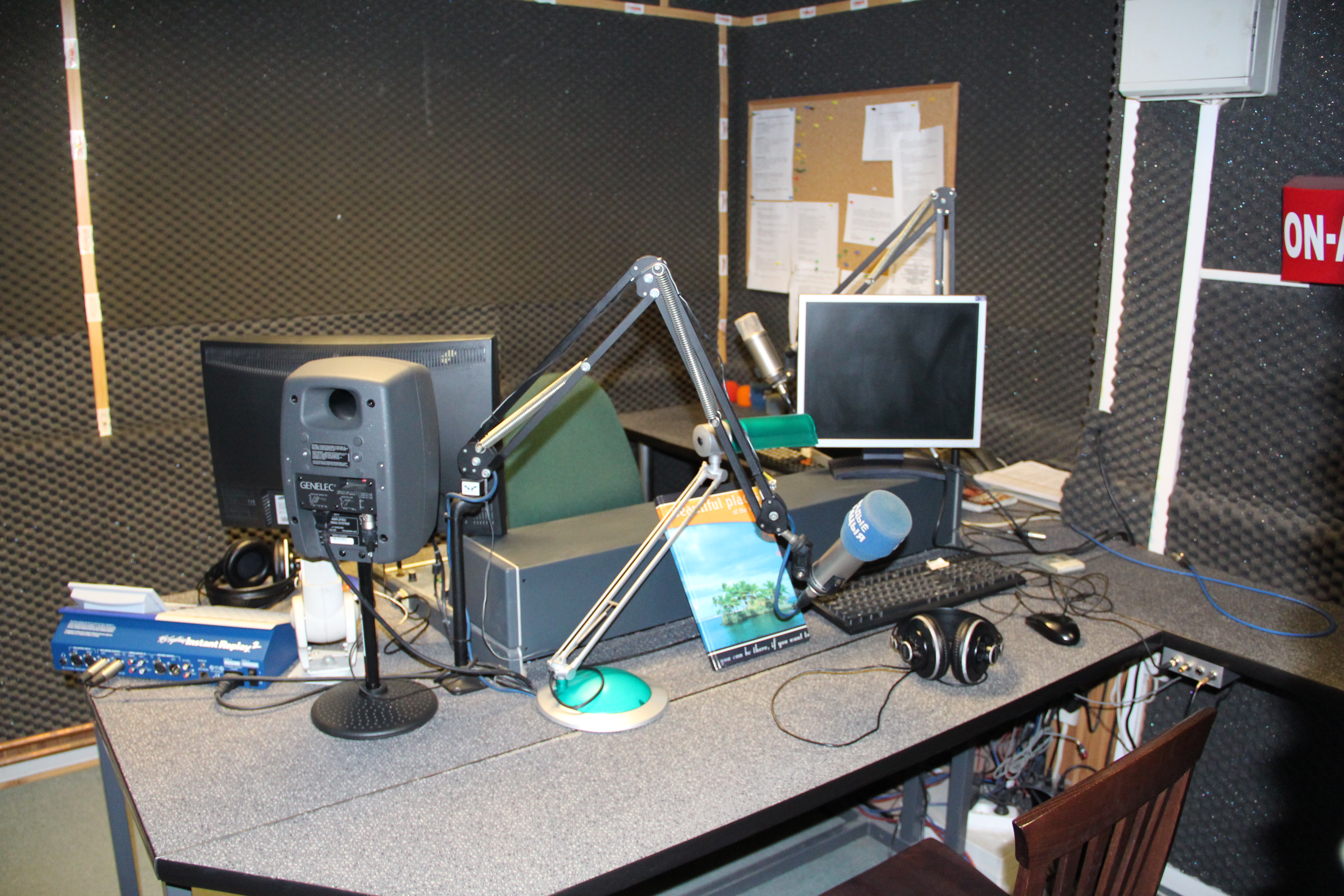 Studio Radia "Racja" w Białymstoku.